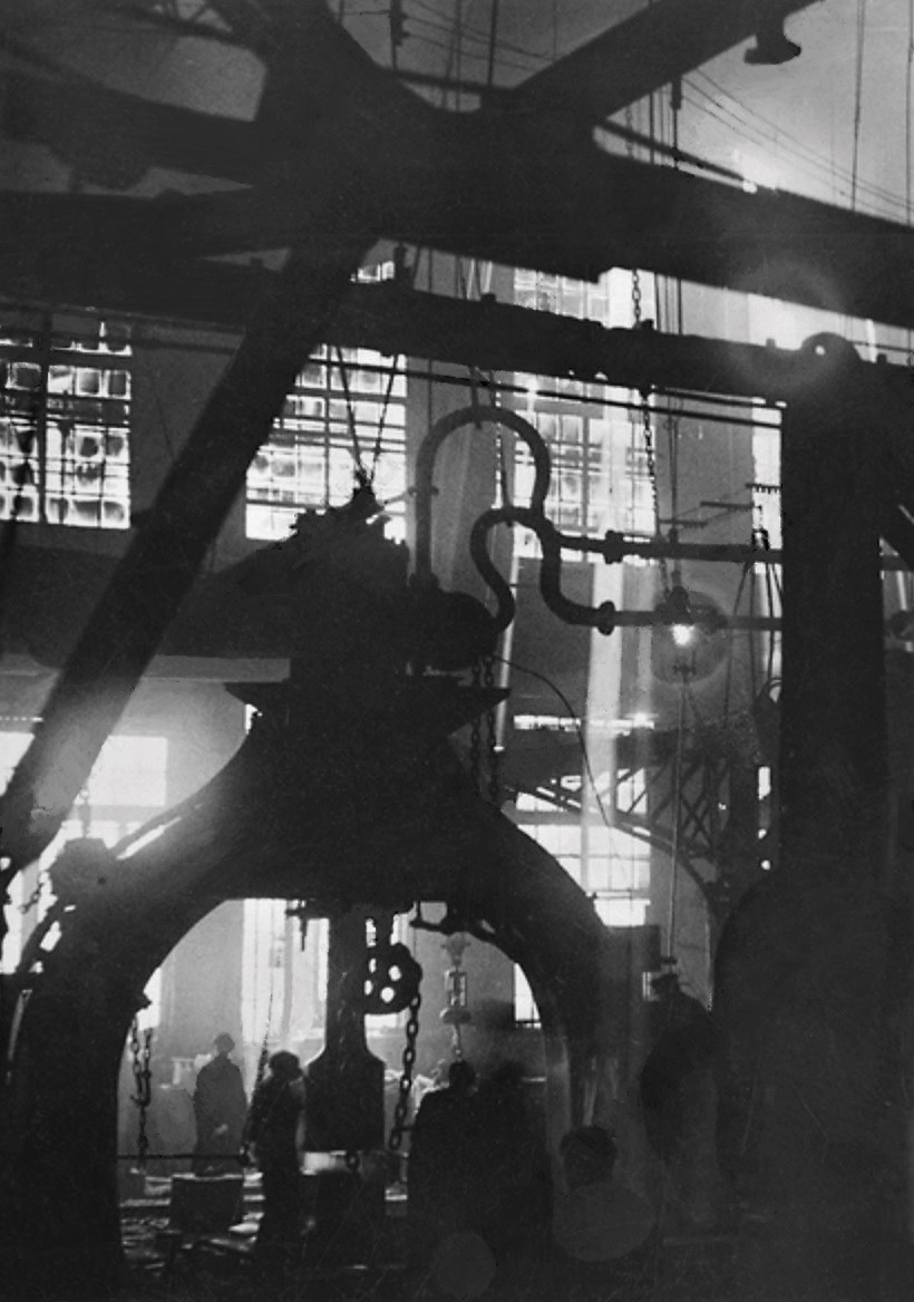 Коломенский завод. Паровой молот